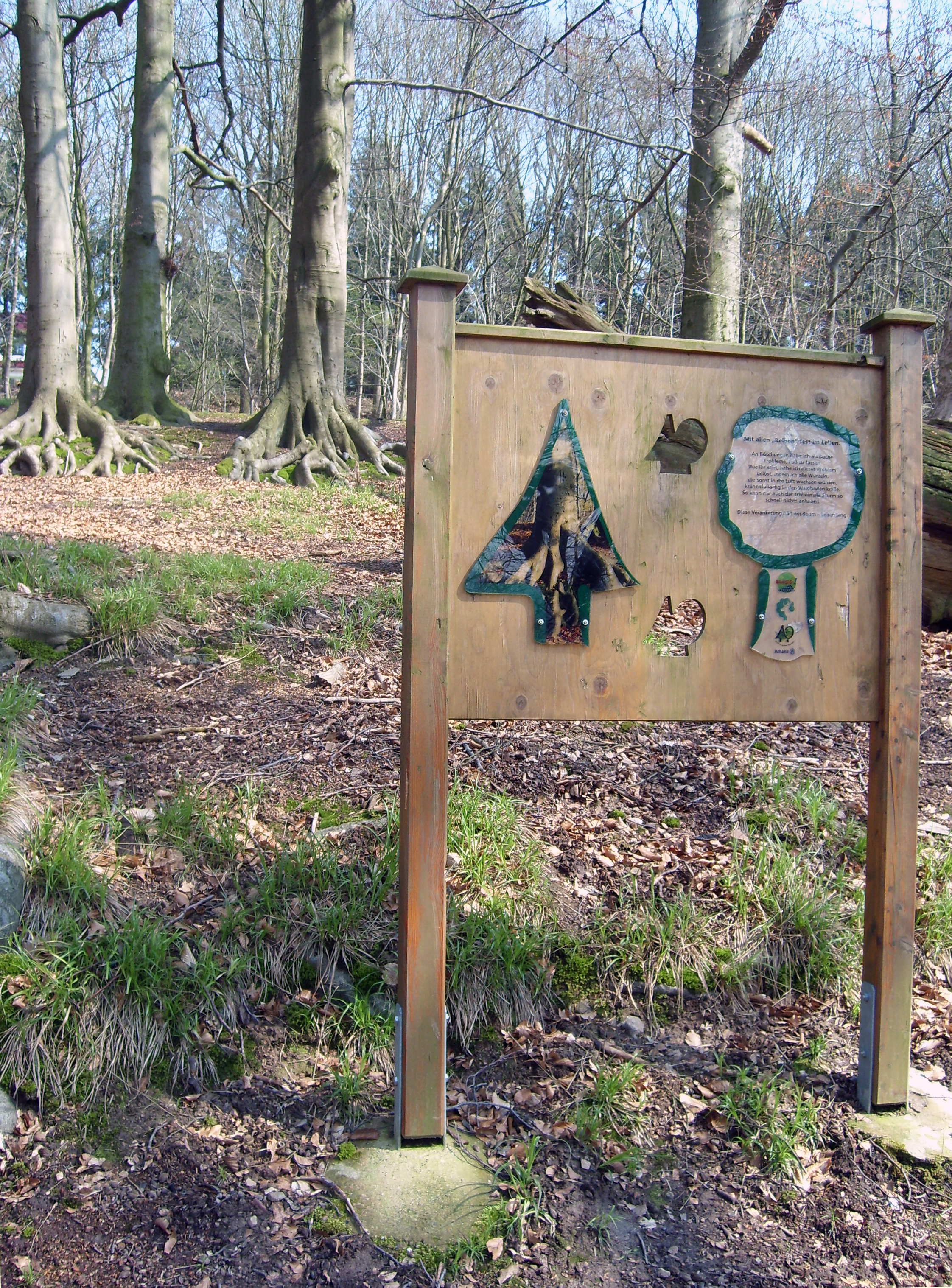 Buchen am Hang. Station des Baumlehrpfads im Uslarer Eichholz.